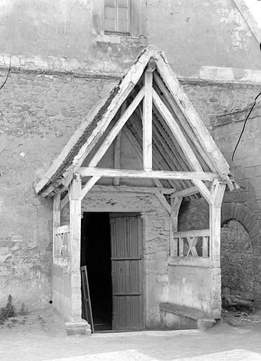 Ancien porche devant le portail occidental.